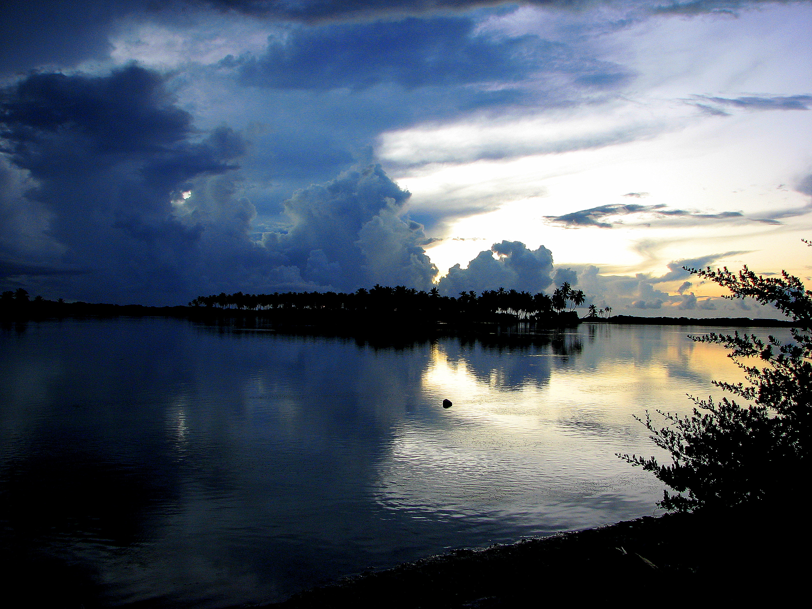 Addu, Hithadhoo